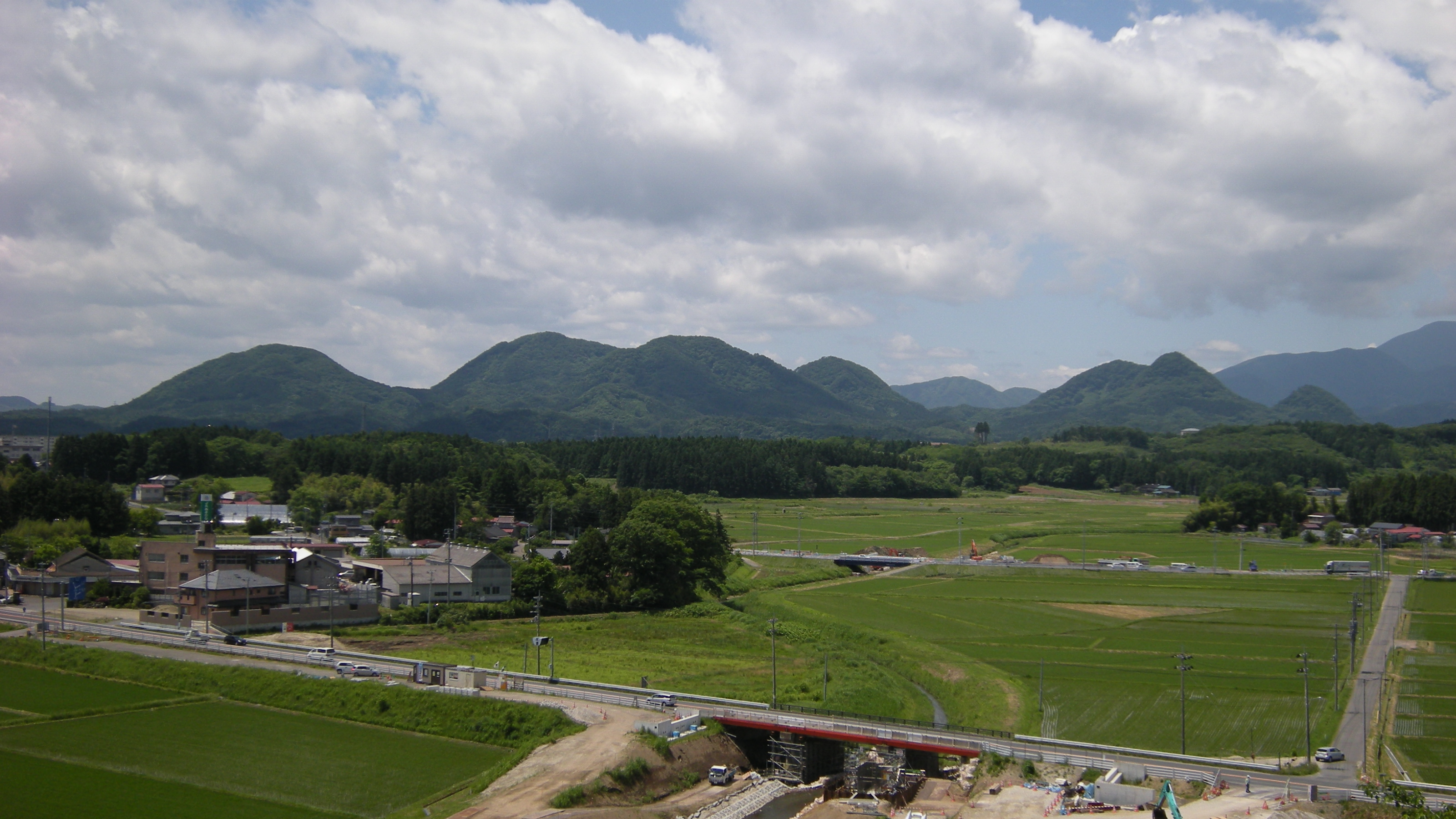 宮城県黒川郡大和町の七ツ森の七山のうちの、東側にかたまった六山。大衡村の大衡城跡より南西に向いて撮影。 左から、松倉山、撫倉山、大倉山、蜂倉山、すこし間が空いて、鎌倉山、遂倉山。遂倉山のさらに右に、低く三角のたんがら森が写っている。笹倉山は、この位置からは撫倉山の背後に隠れている。手前の道路は国道四号線。